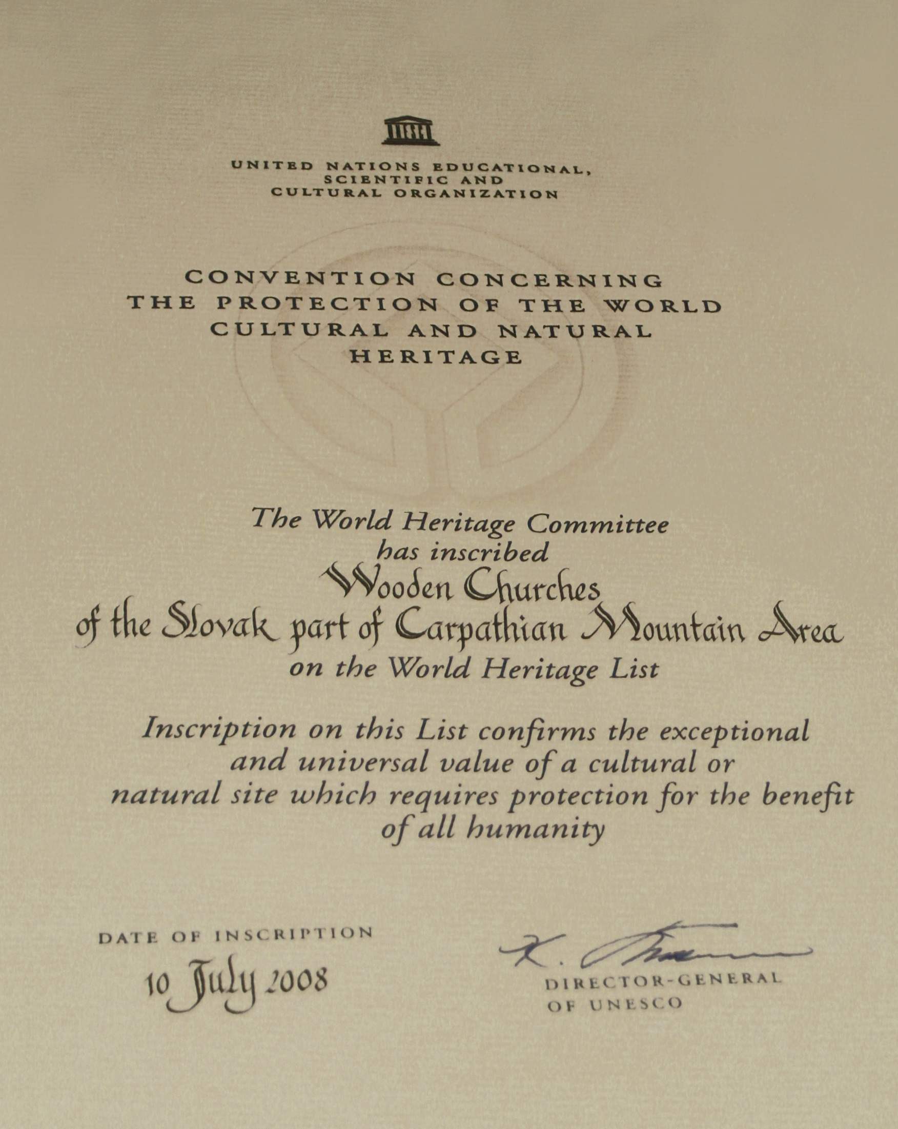 Certifikát UNESCO so zápisu cerkvi svätého Mikuláša do zoznamu svetového kultúrneho dedičstva